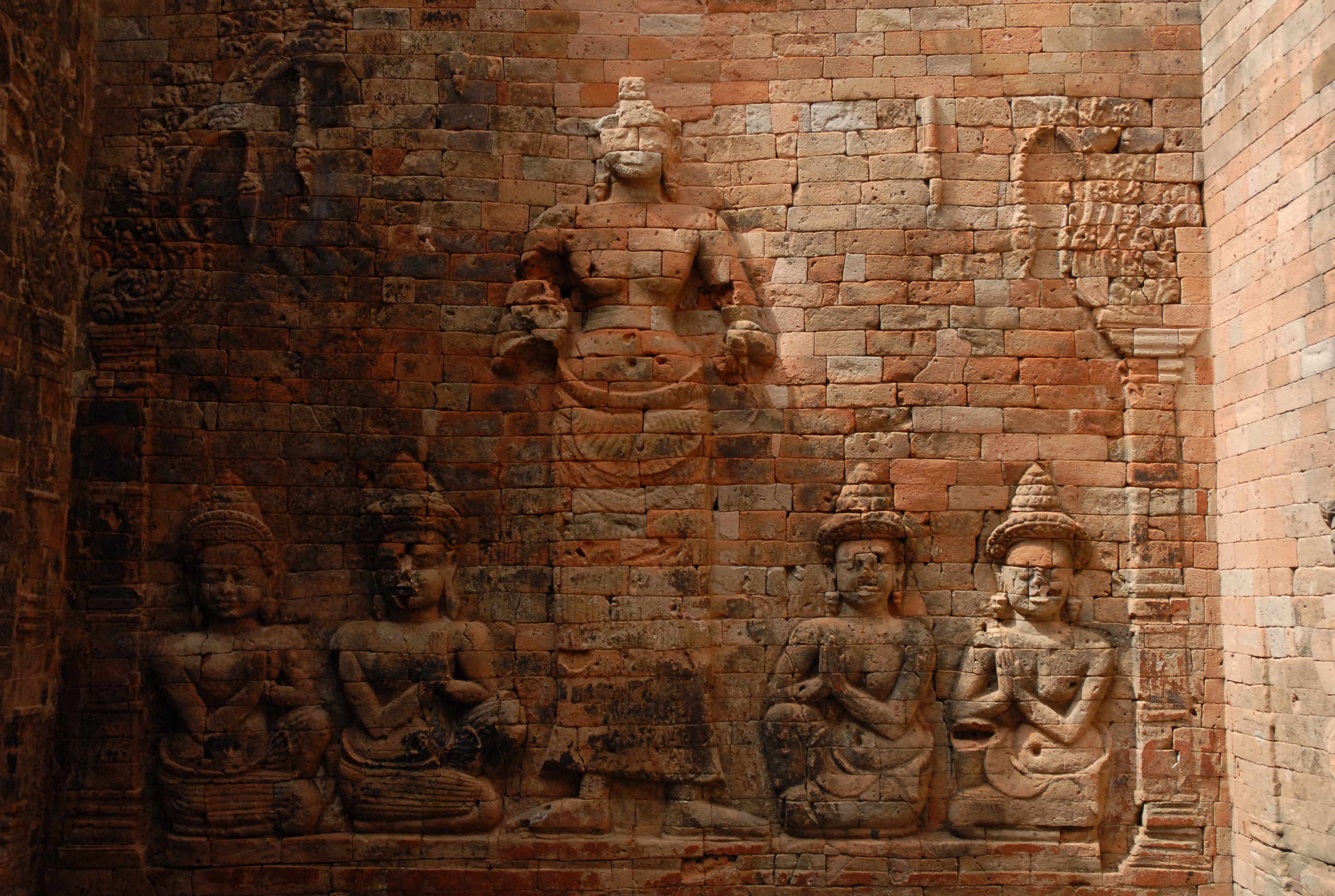 Cambodge, temple de Prasat Kravan, sanctuaire nord : Lakshmî (épouse de Vishnu) et des orants